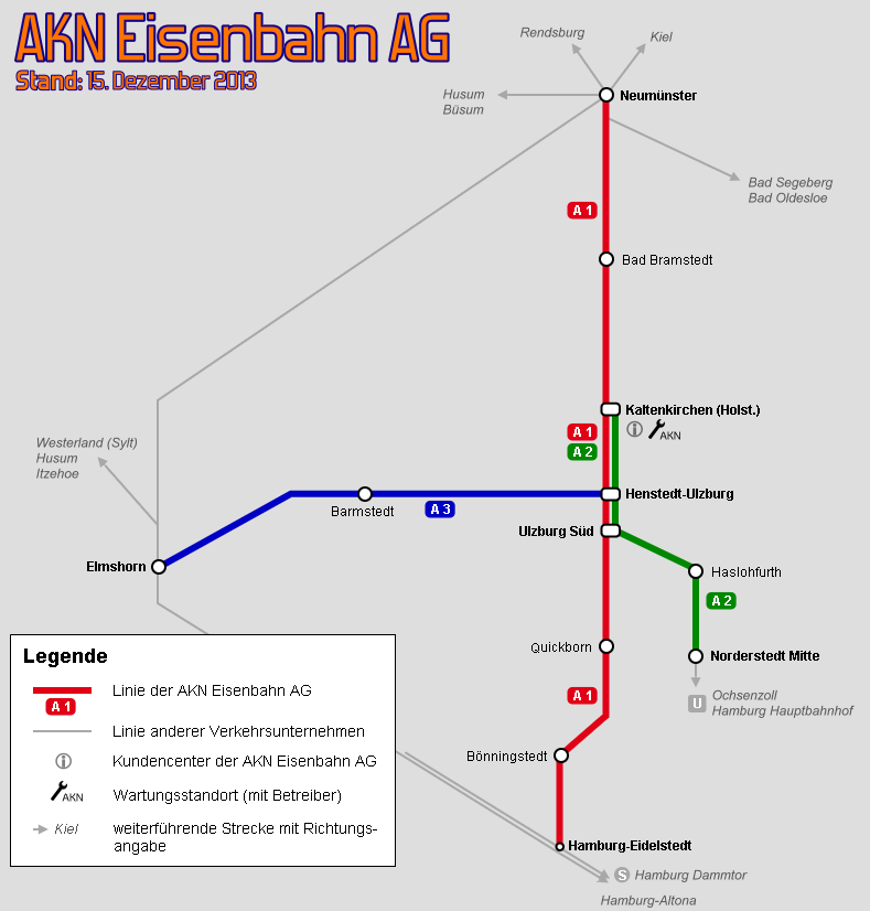 Liniennetz der AKN Eisenbahn